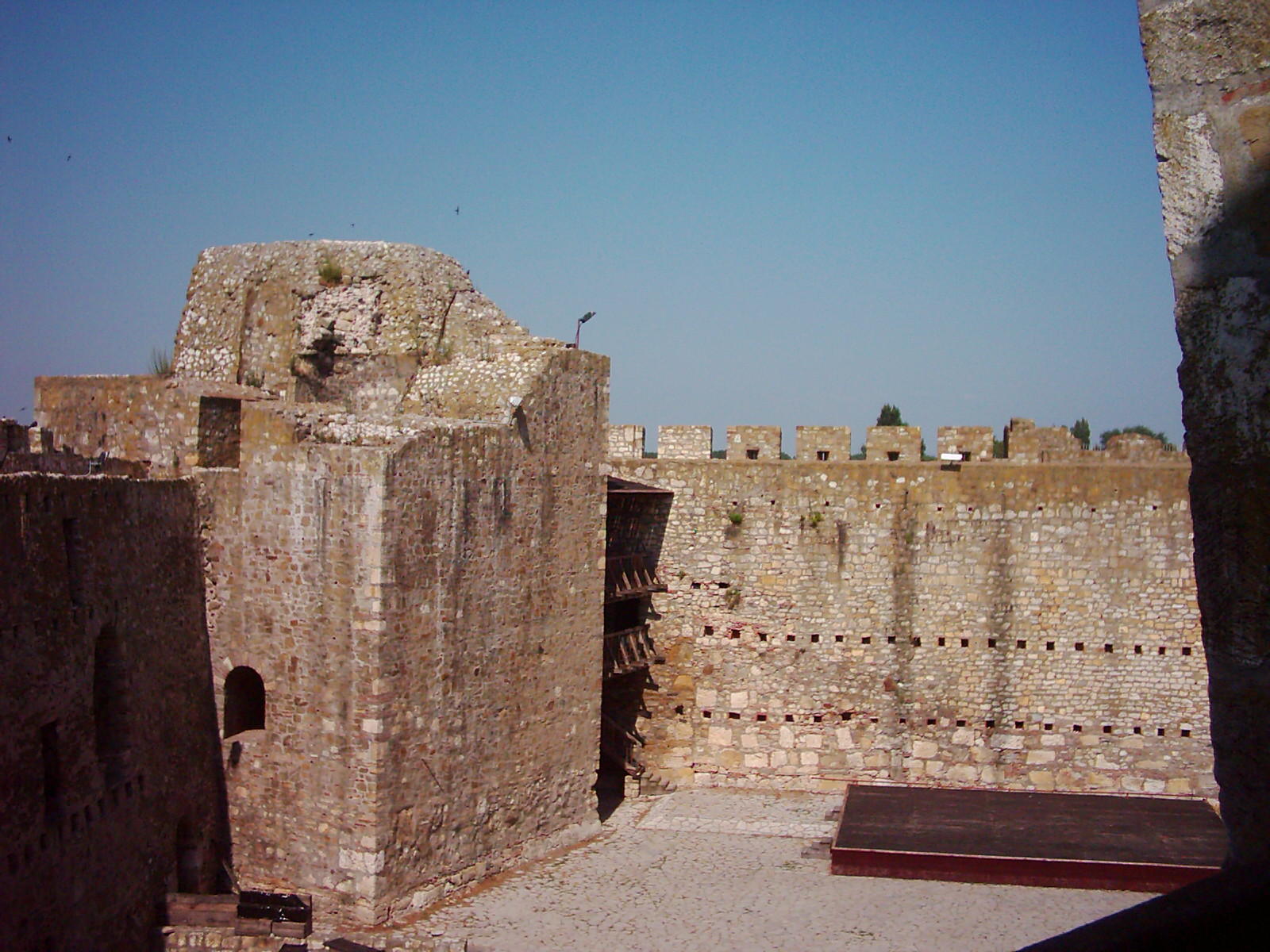 My picture. My editing. I give it (the picture) to the world.